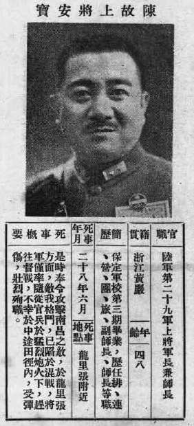 抗戰軍人忠烈錄第一輯中的烈士遺像